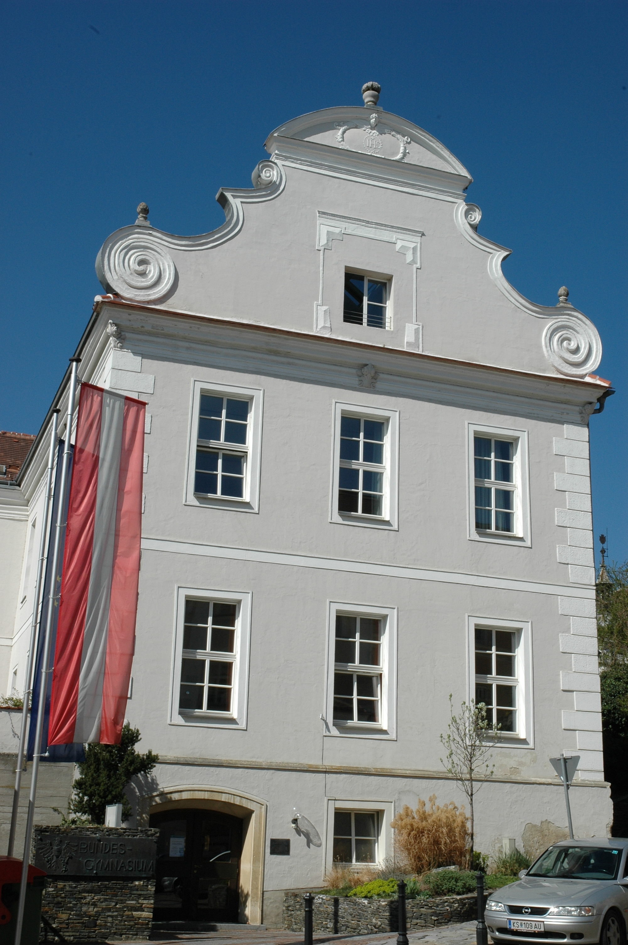 Piaristengymnasium Krems 2